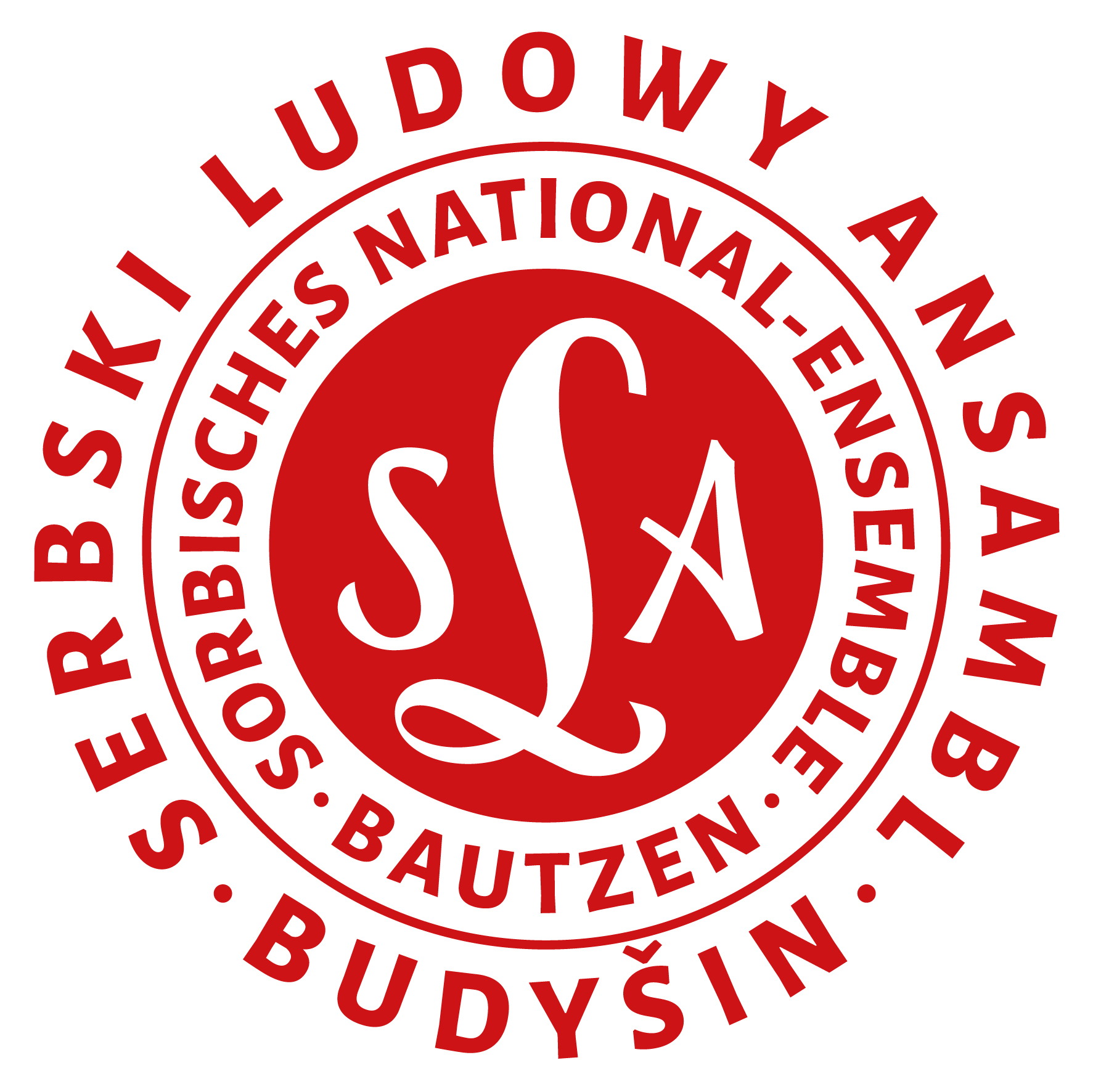 Logo des SNE